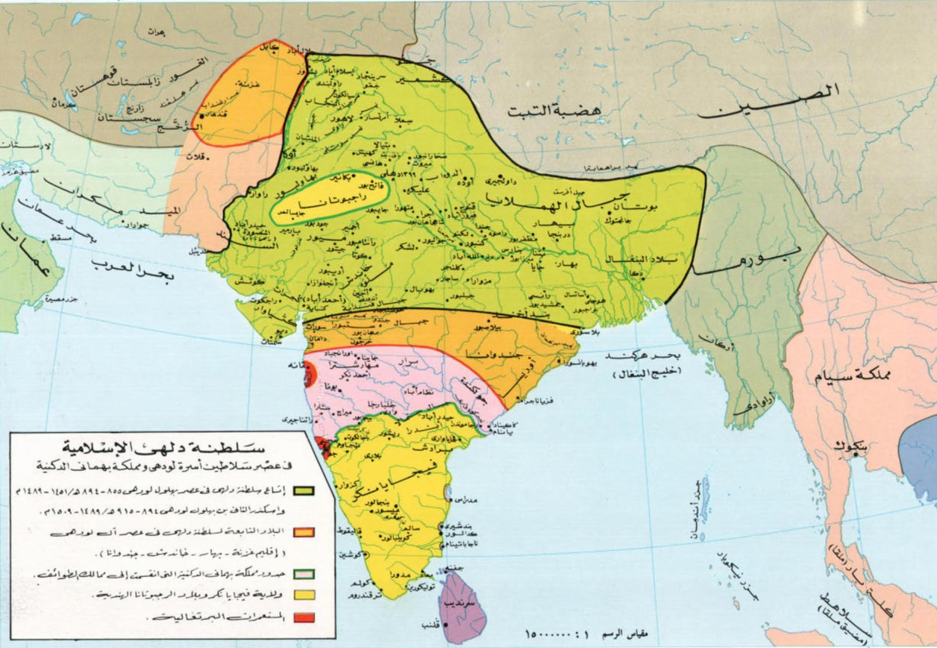 خريطة سلطنة دلهي في عصر سلاطين أُسرة لودهي ومملكة بهماني الدكنيَّة.